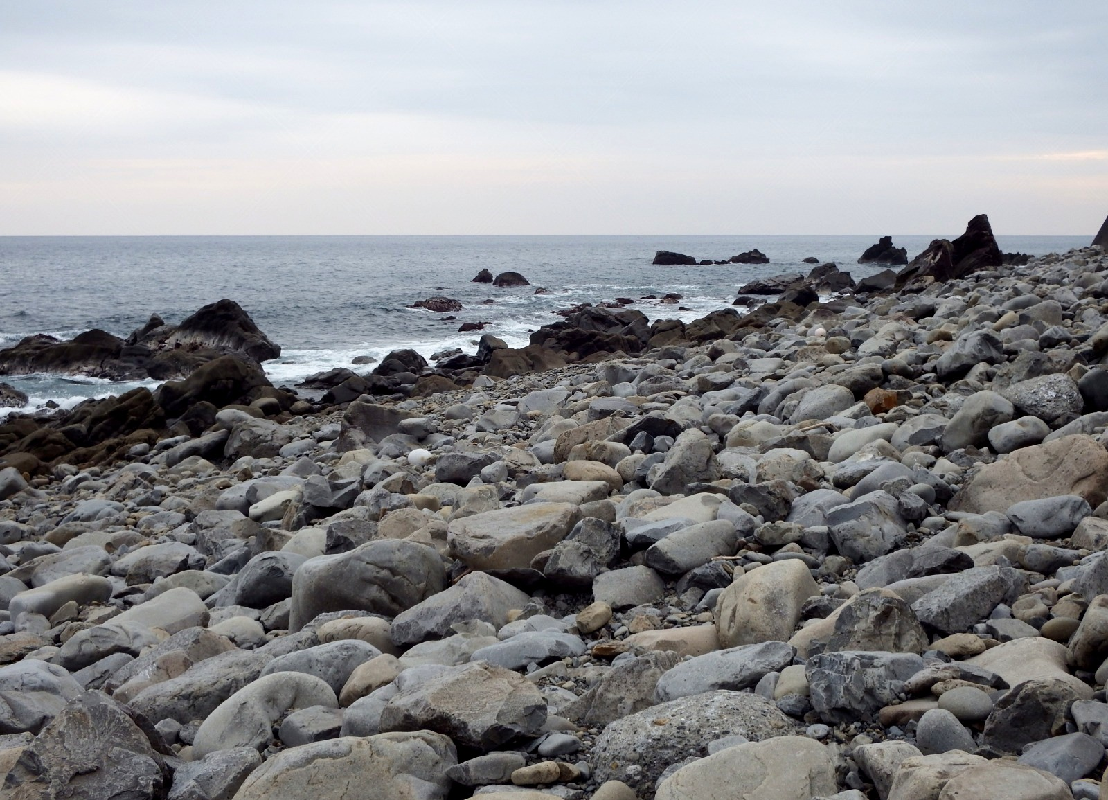 遍路道 ごろごろ石